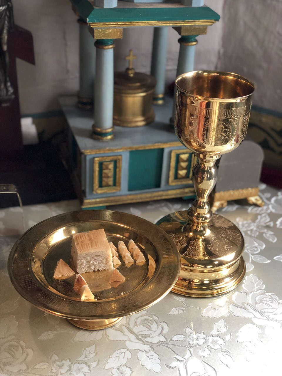 Фото зроблені в Свято-Георгіївському храмі Православної Церкви України в с. Колоденка, Рівненської області, Україна